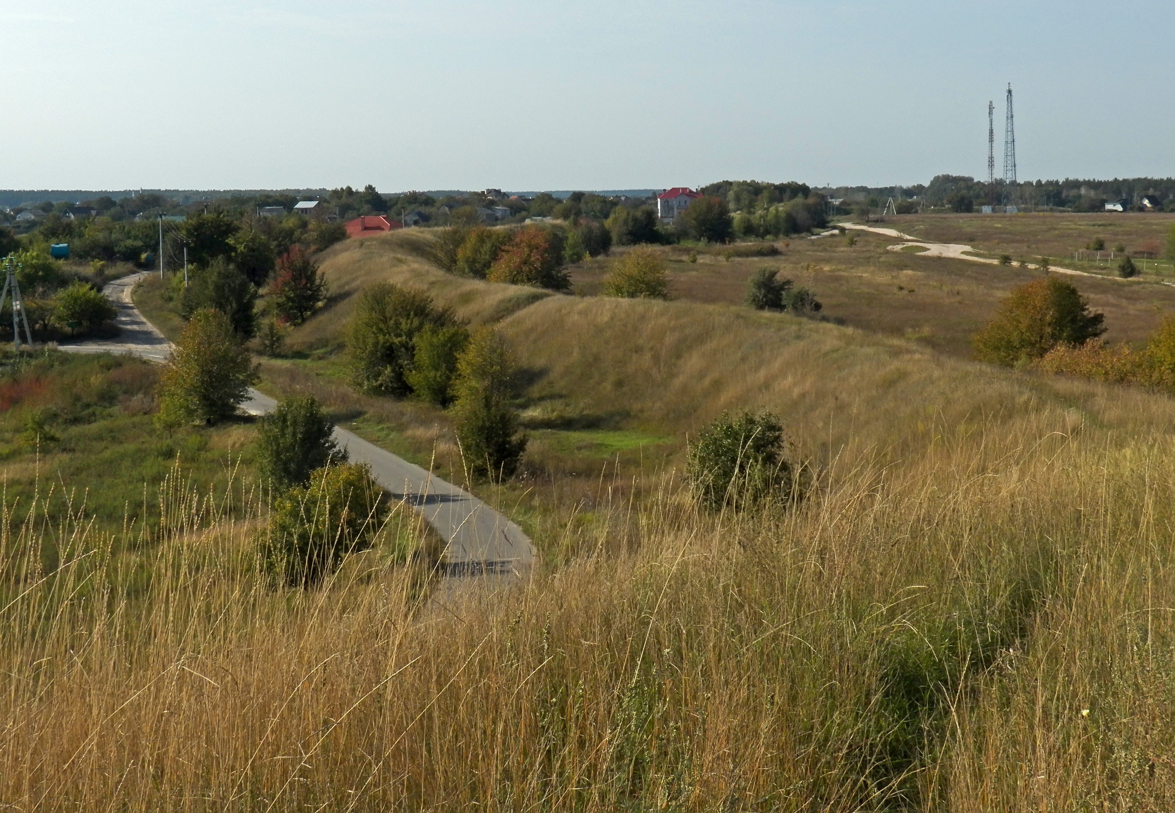 Змієві вали біля села Іванковичі у Васильківському районі Київської області